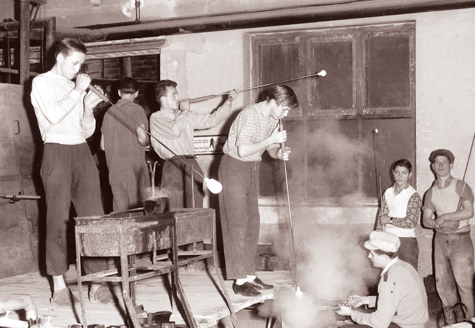 Tovarna steklenih izdelkov